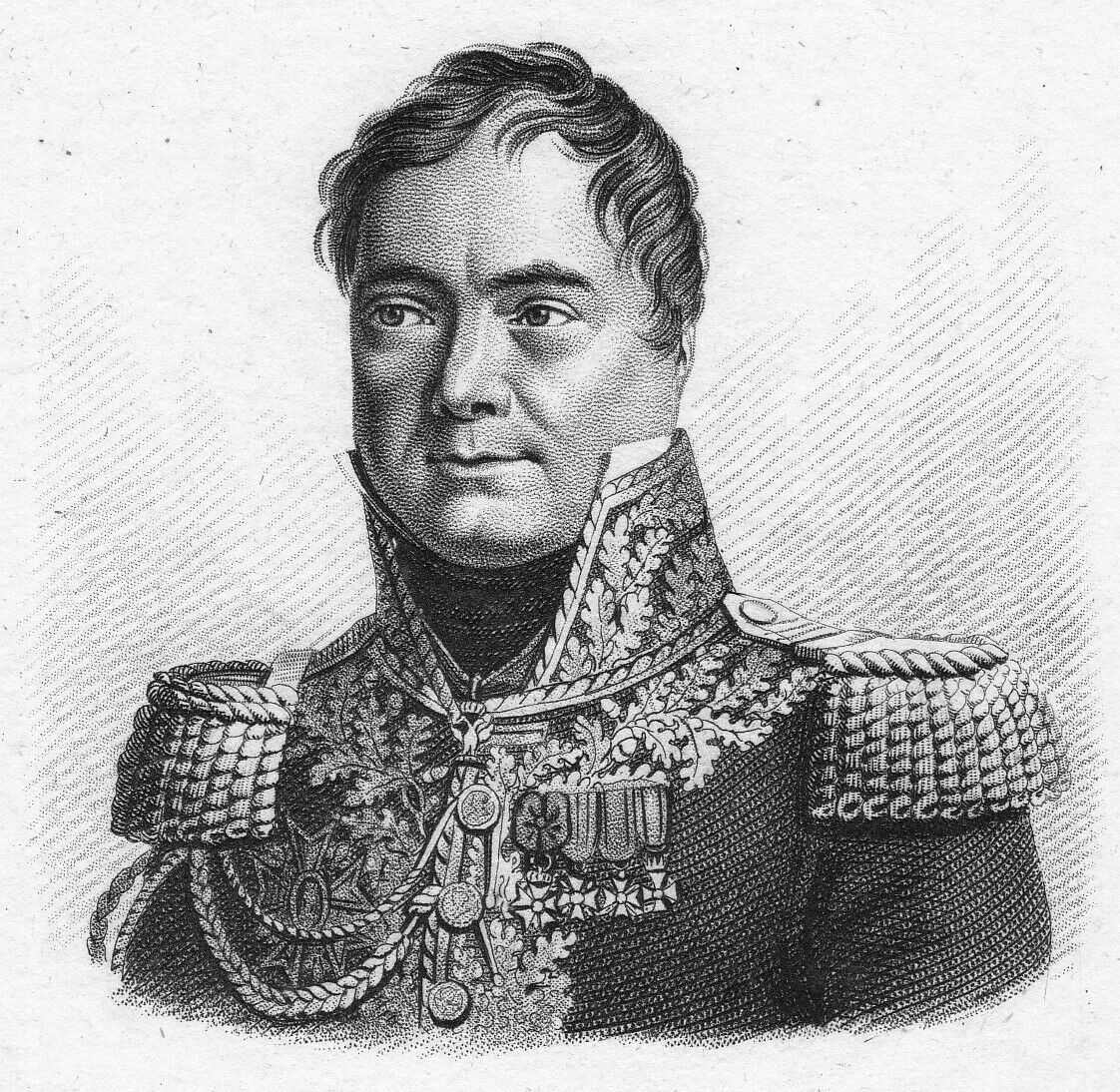 Georges Mouton, comte de Lobau, général d'Empire (1770-1838). Il est élevé à la dignité de maréchal de France en 1831.